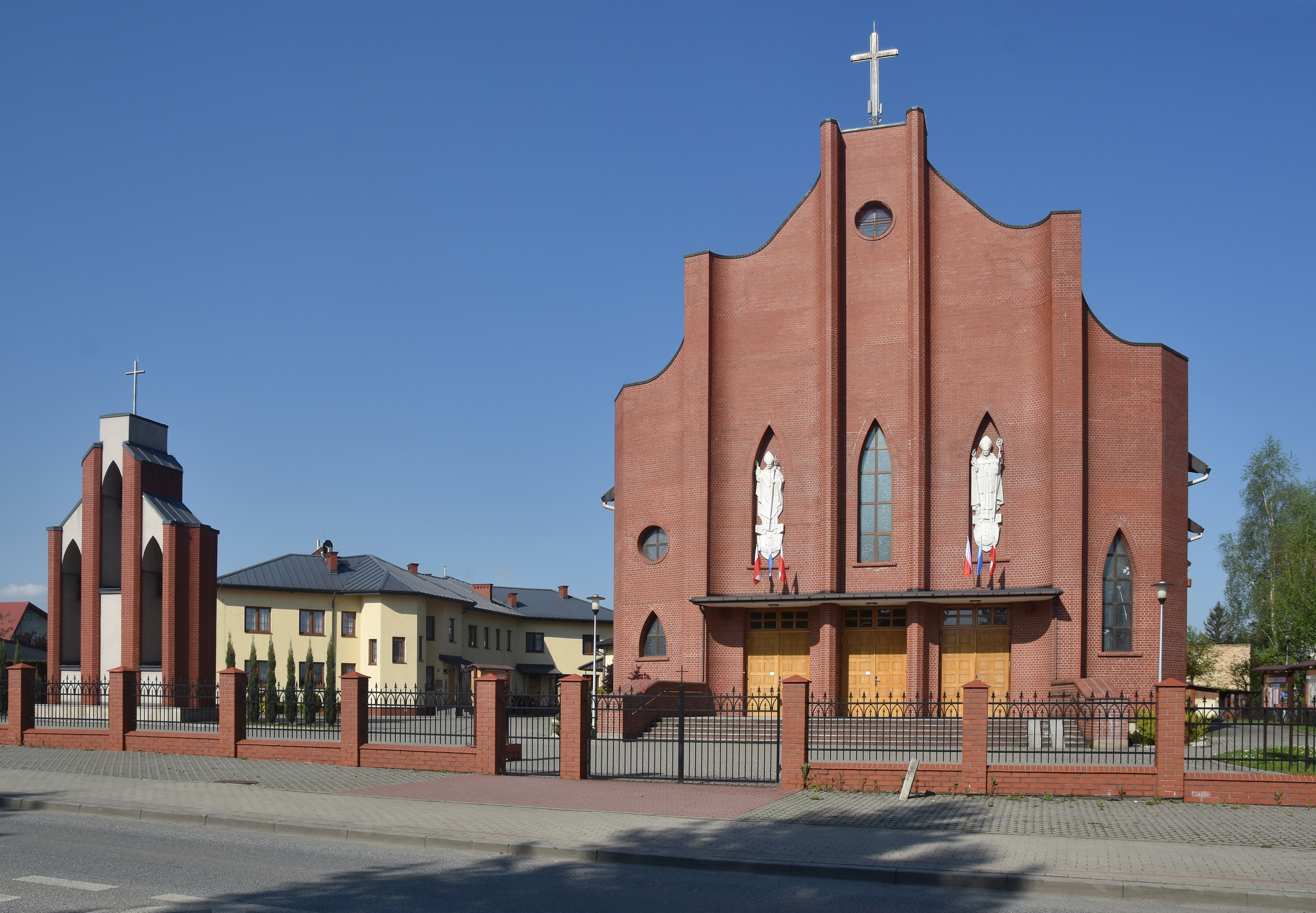 miasto Jasło